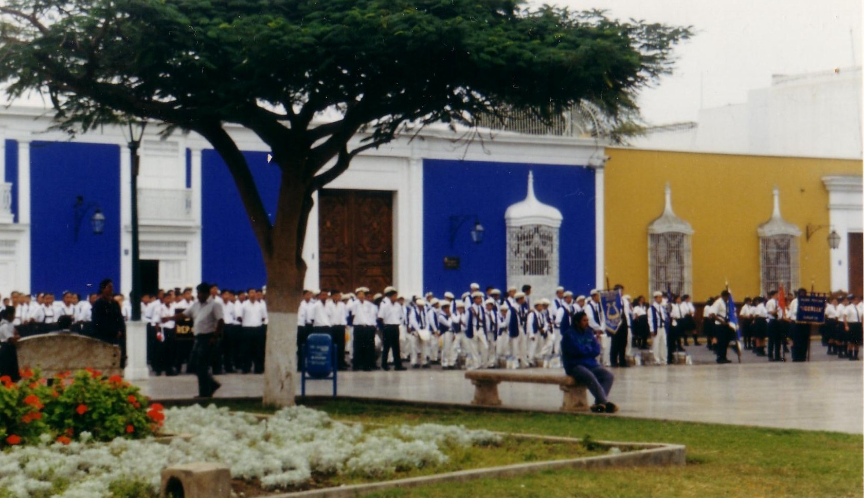 Plaza de Armas, Trujillo